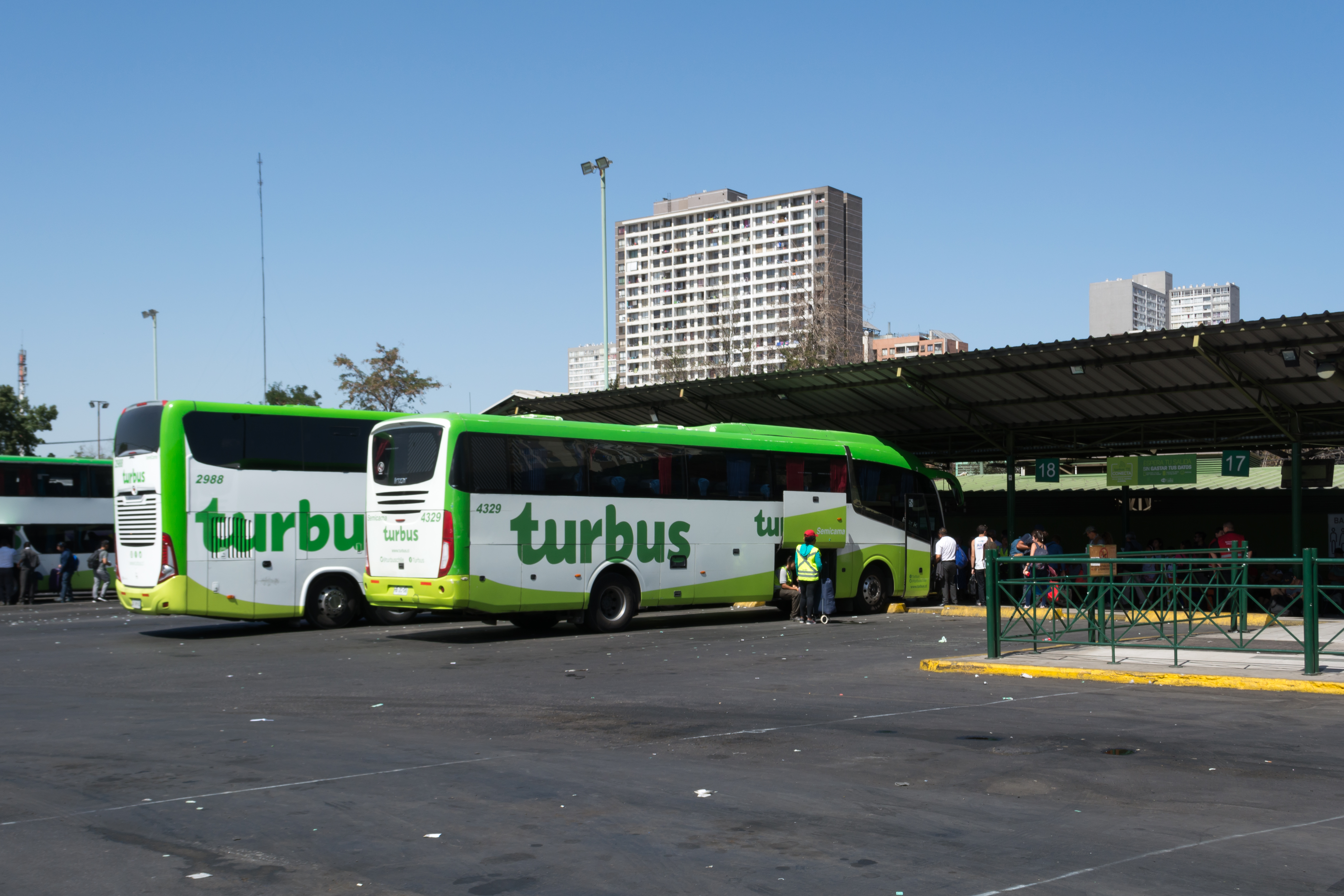 Terminal Alameda, Estación Central, Santiago, Región Metropolitana, Chile